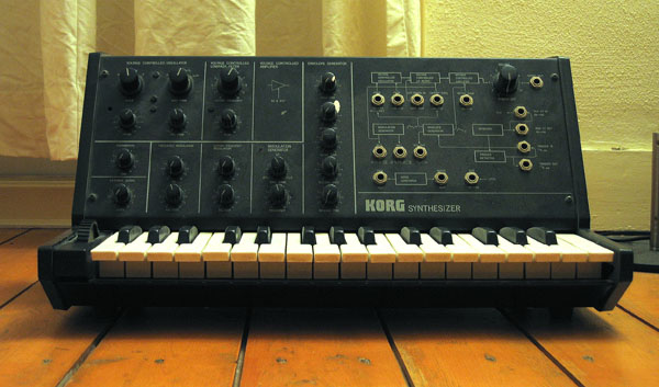 Dit is een foto die ik zelf heb gemaakt van mijn eigen MS10 synthesizer